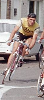 Frans Aerenhouts in een Belgische koers (1967)